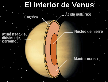 Autor: Usuario:Luis María Benítez